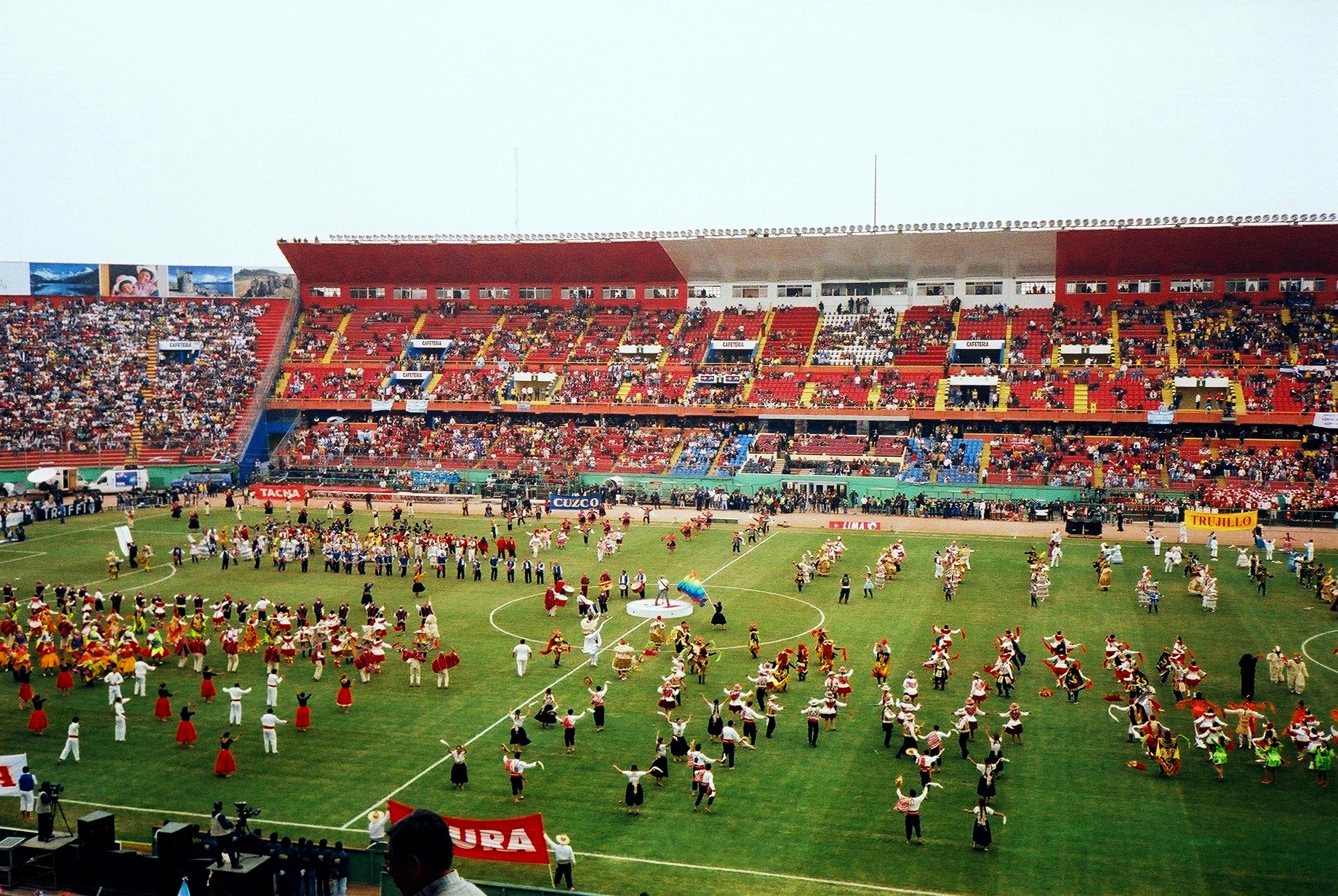 Estadio Nacional del Perú, Lima. Final of the Copa América 2004. July 25, 15:00. Brazil x Argentina 2-2, Penalties: 4-2